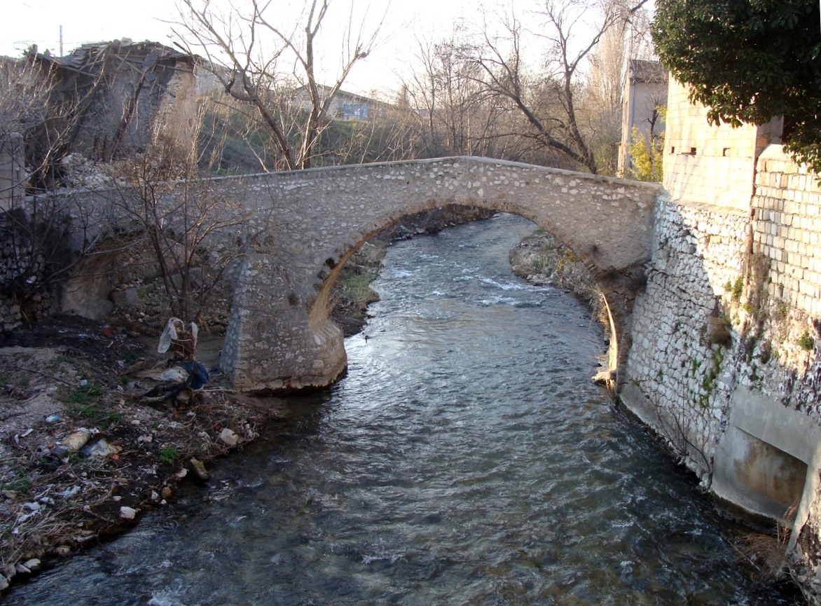 Le vieux pont sur l'Huveaune à Saint-Marcel (Marseille 11e arr.)